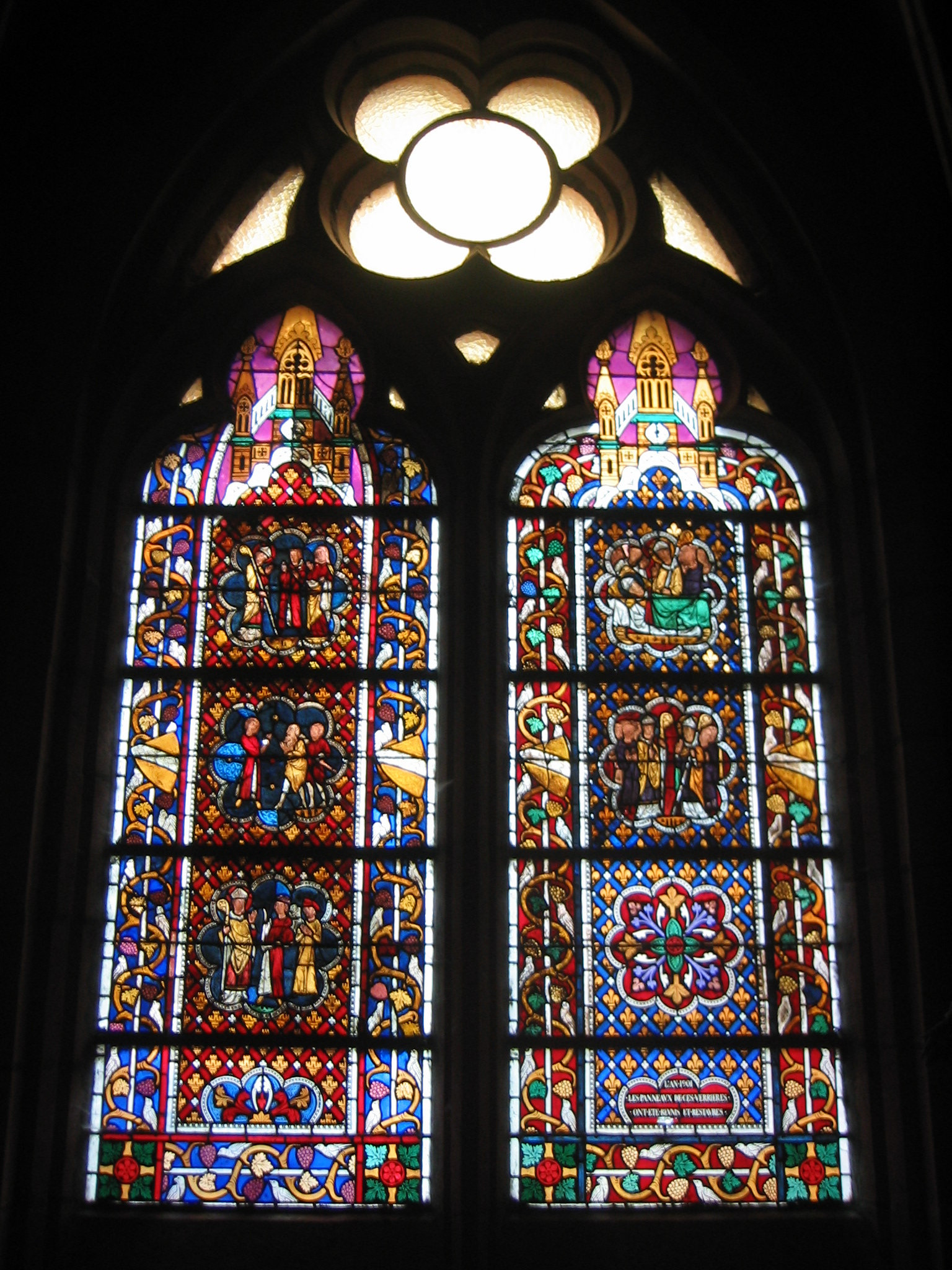 Cathédrale de Saint-Dié-des-Vosges, deuxième chapelle latérale nord : vitrail droit 13ème siècle (1285-1290).